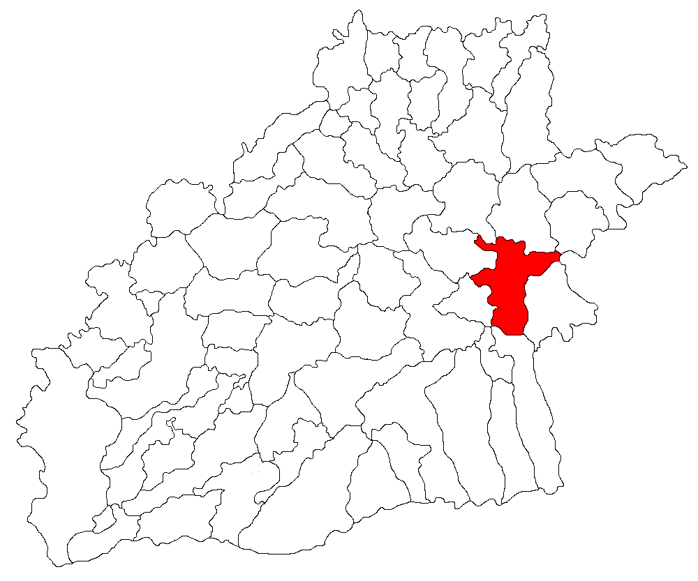 Categorie:Hărţi ale judeţului Sibiu